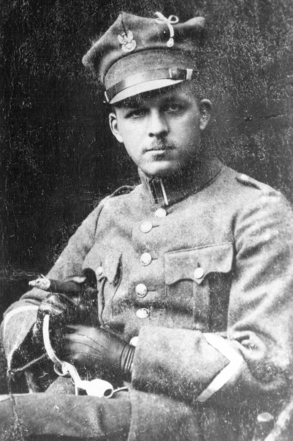 Jan Stanisław Kaczmarek (1894-1981) w mundurze podporucznika Sił Zbrojnych Polskich byłego zaboru pruskiego. Fotografia wykonana w 1919.